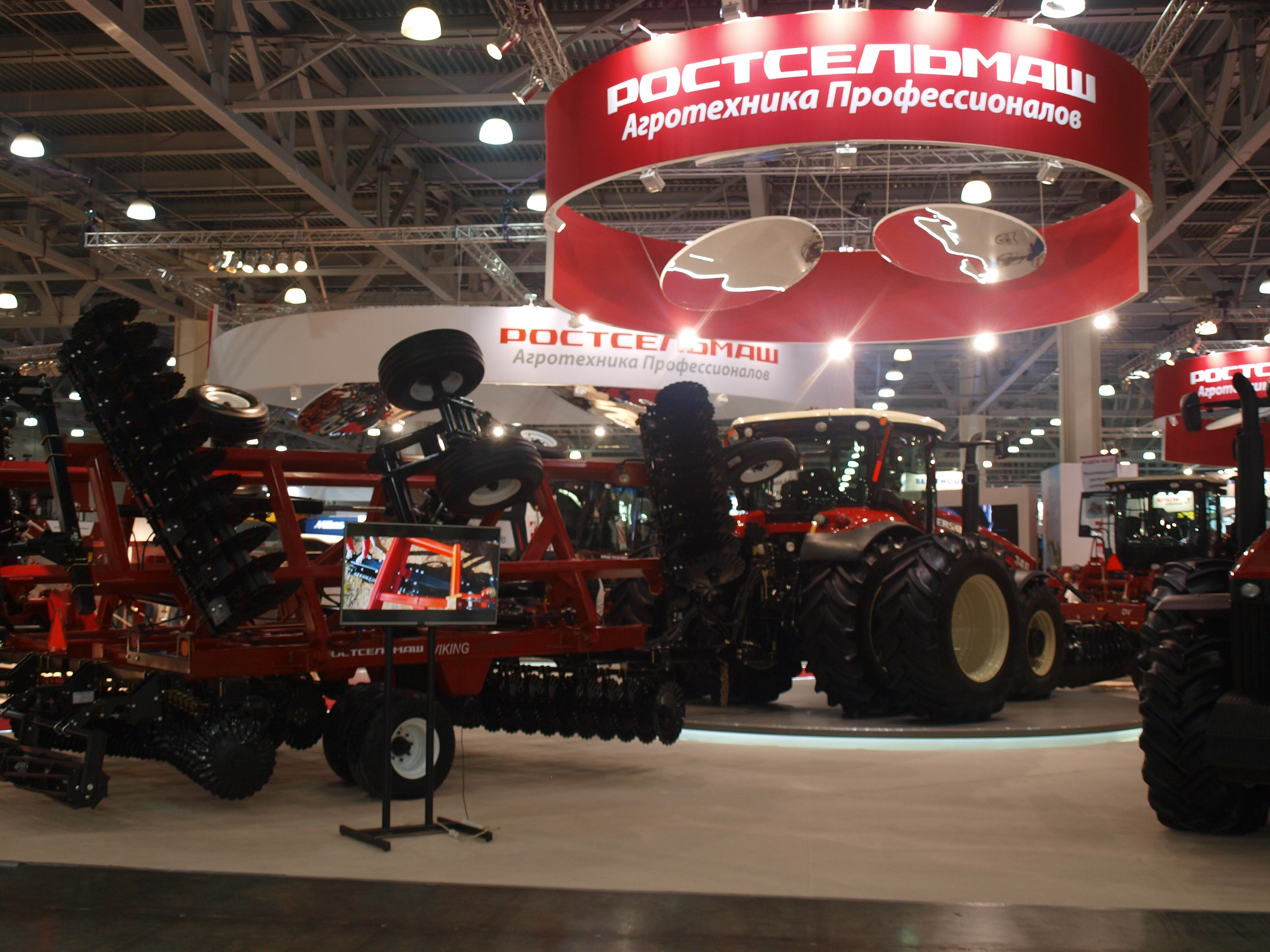 Крокус Экспо